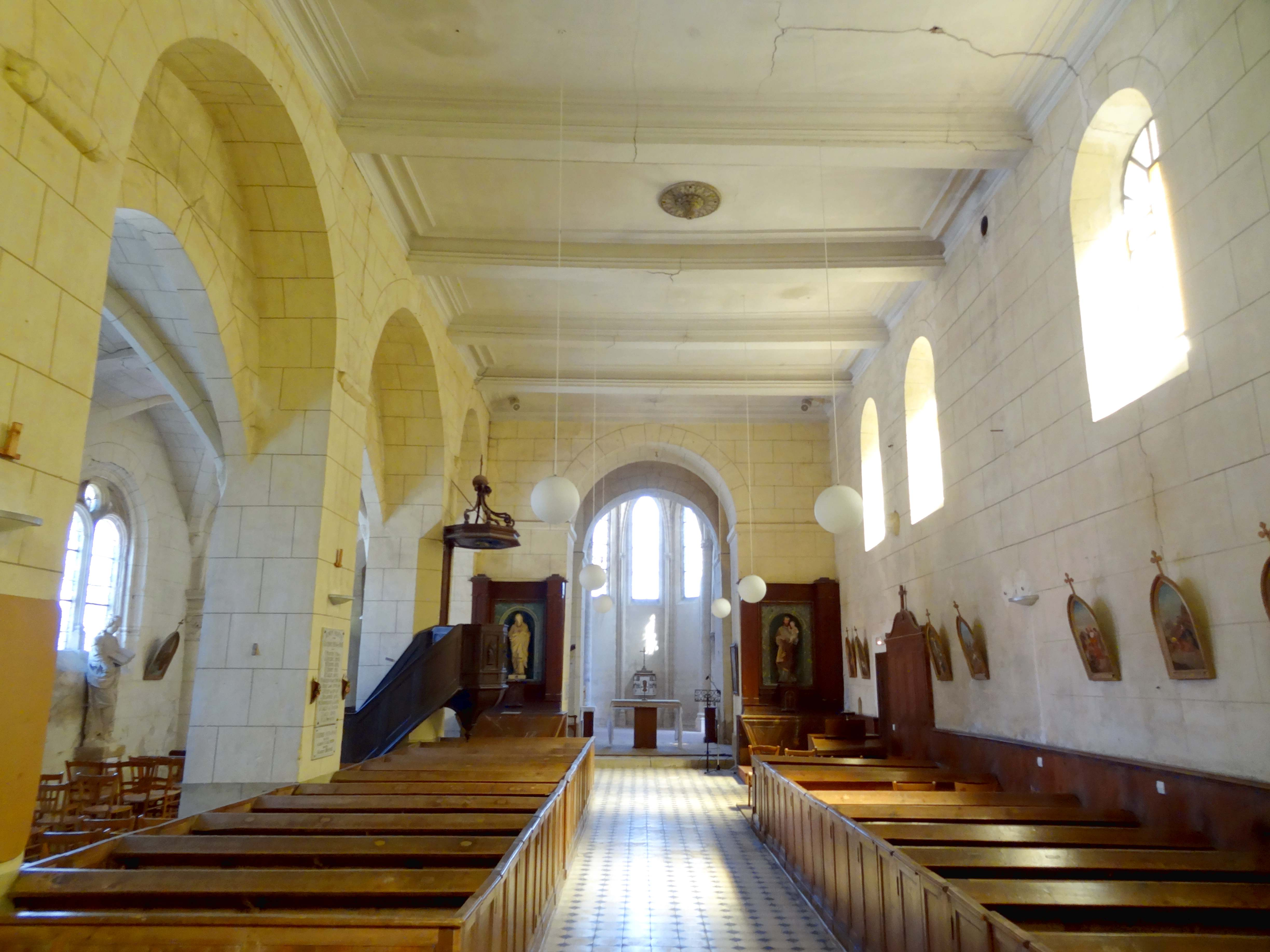 Intérieur de l'église - voir titre.